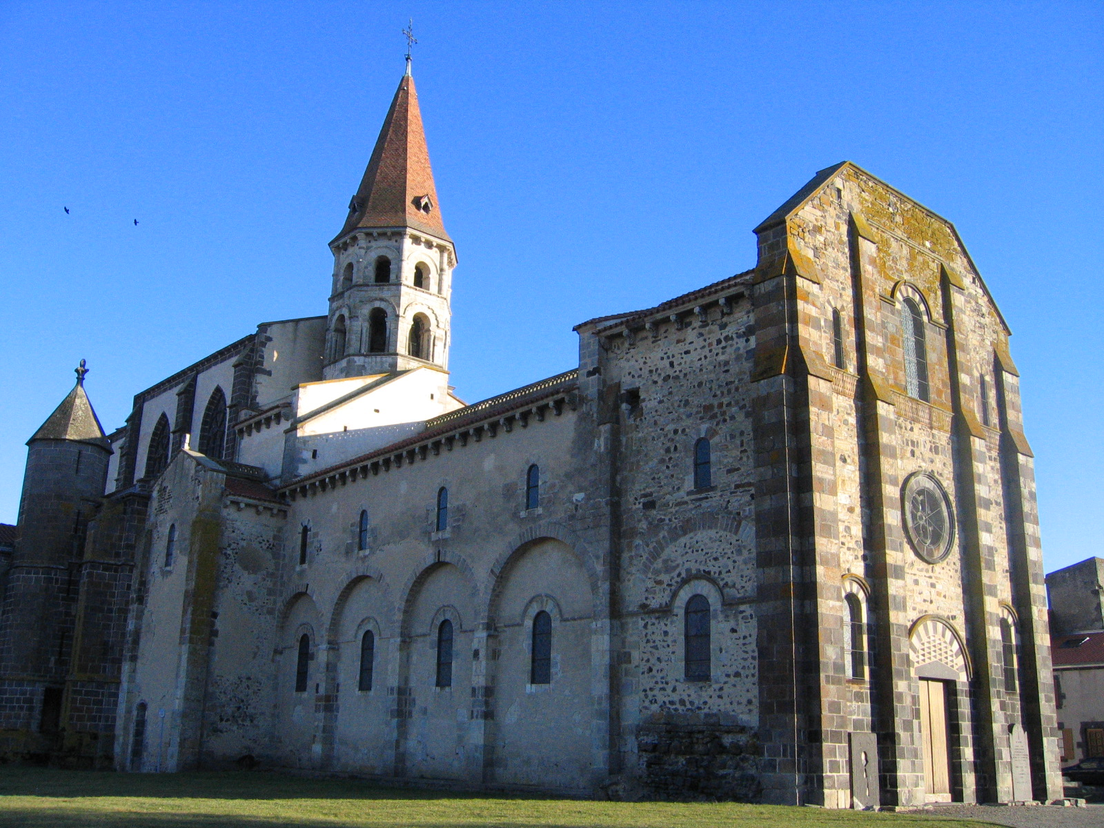 Eglise d'Ennezat (Département du Puy-de-Dôme, région Auvergne) Auteur Jean-Marc Aubelle